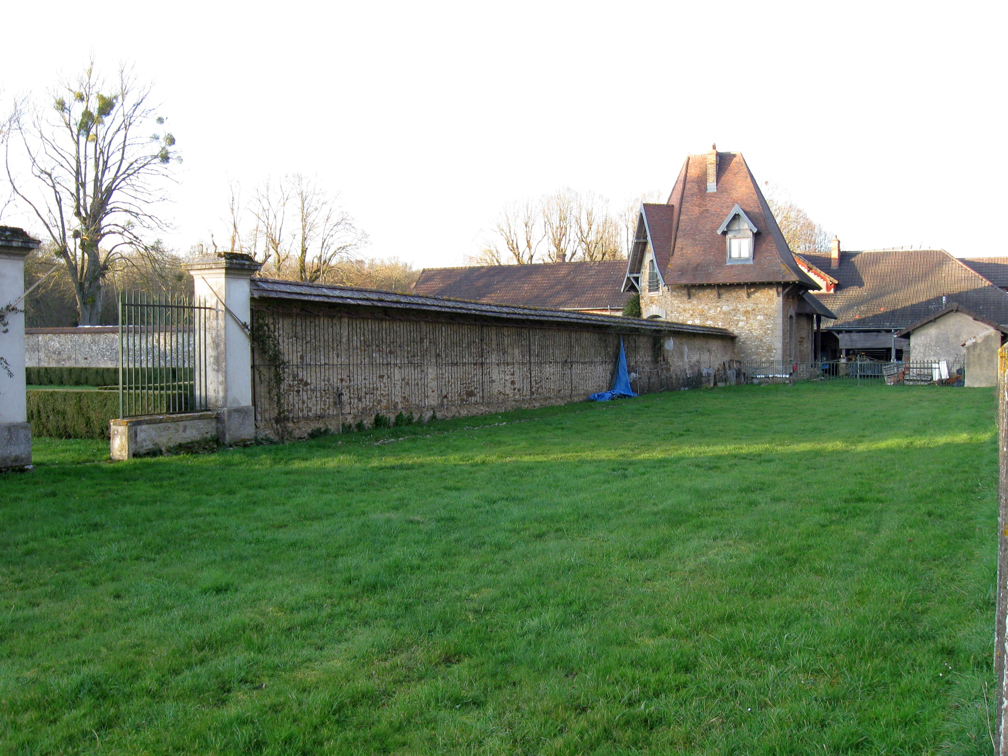 Pavillon du jardinier, domaine du Bréau, Villiers-en-Bière. (Seine-et-Marne, région Île-de-France).